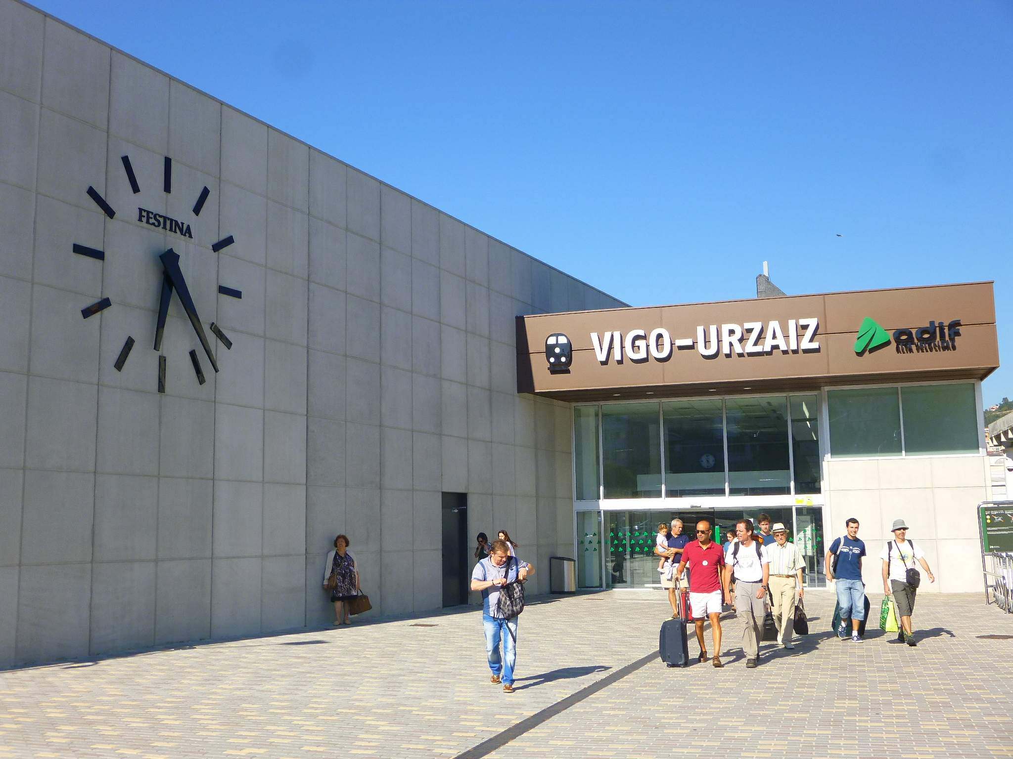 Vigo - Estación de ADIF de Vigo-Urzáiz